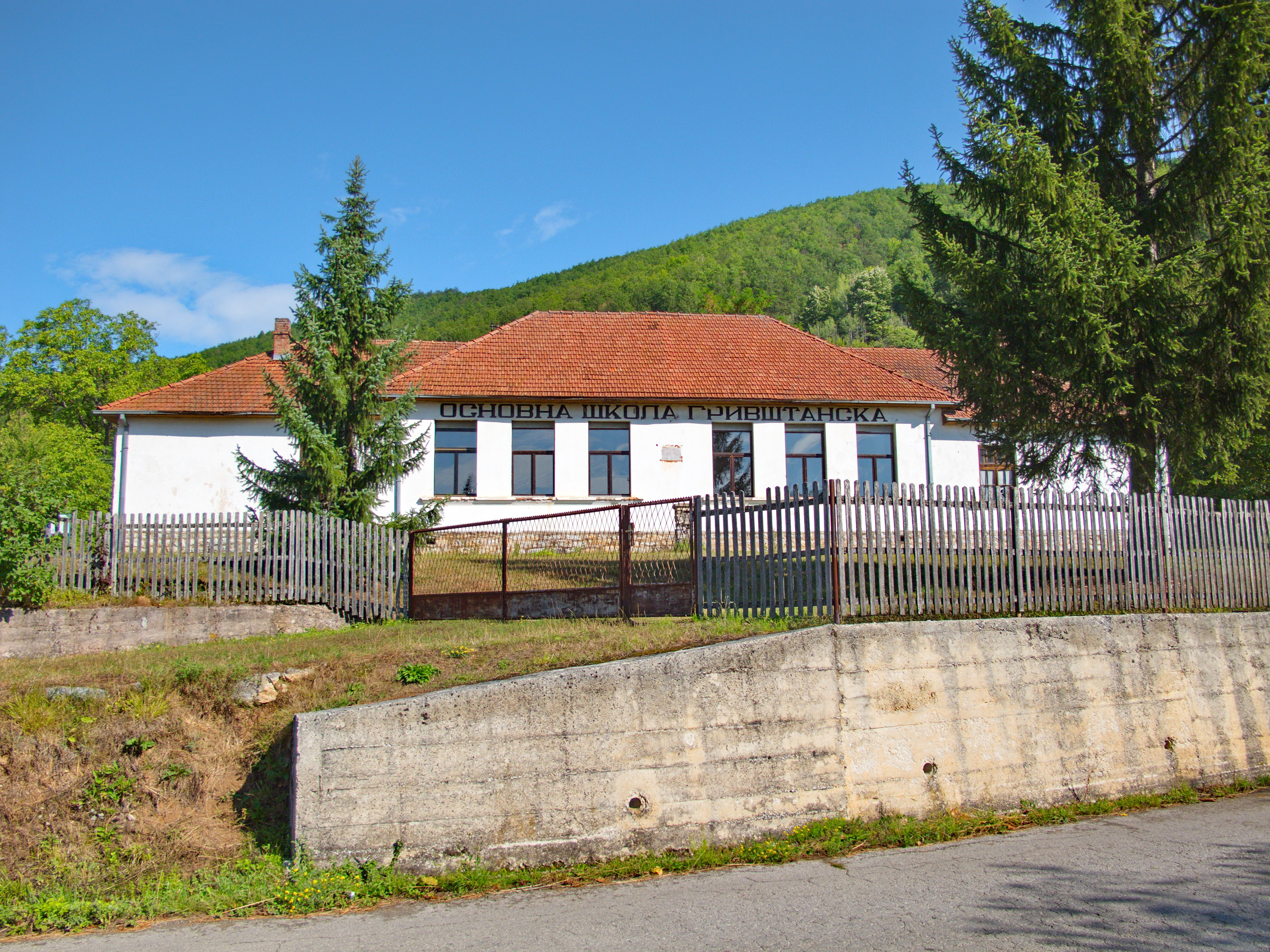 Гривска, гривштанска основна школа.